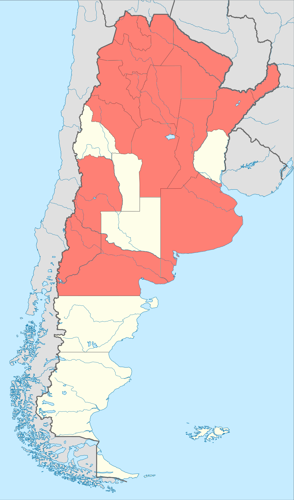 Mapa de las provincias de Argentina en que actúa la Organización Barrial Túpac Amaru.